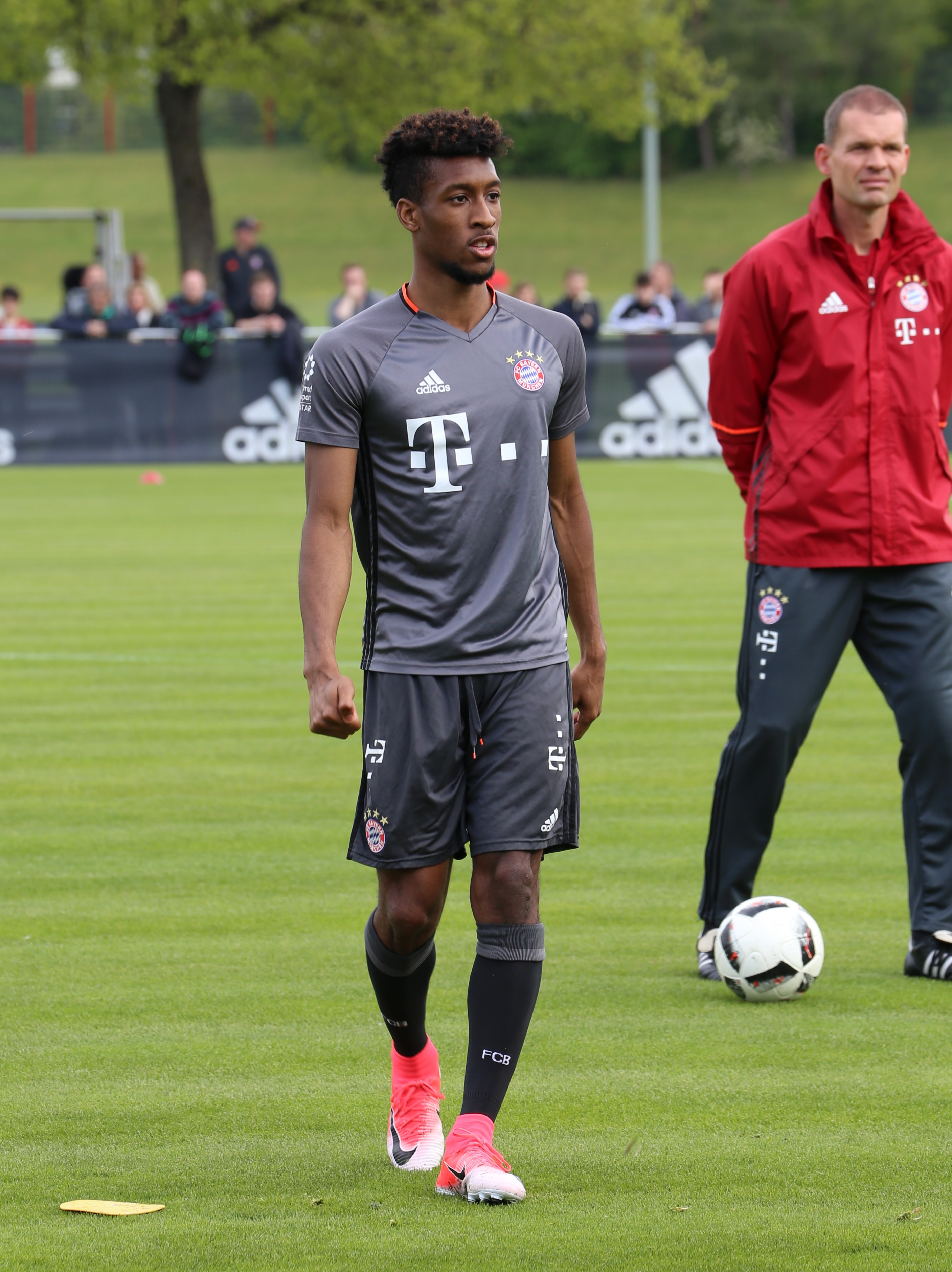 Kingsley Coman, am 3. Mai 2017 beim Training auf dem Gelände des FC Bayern München